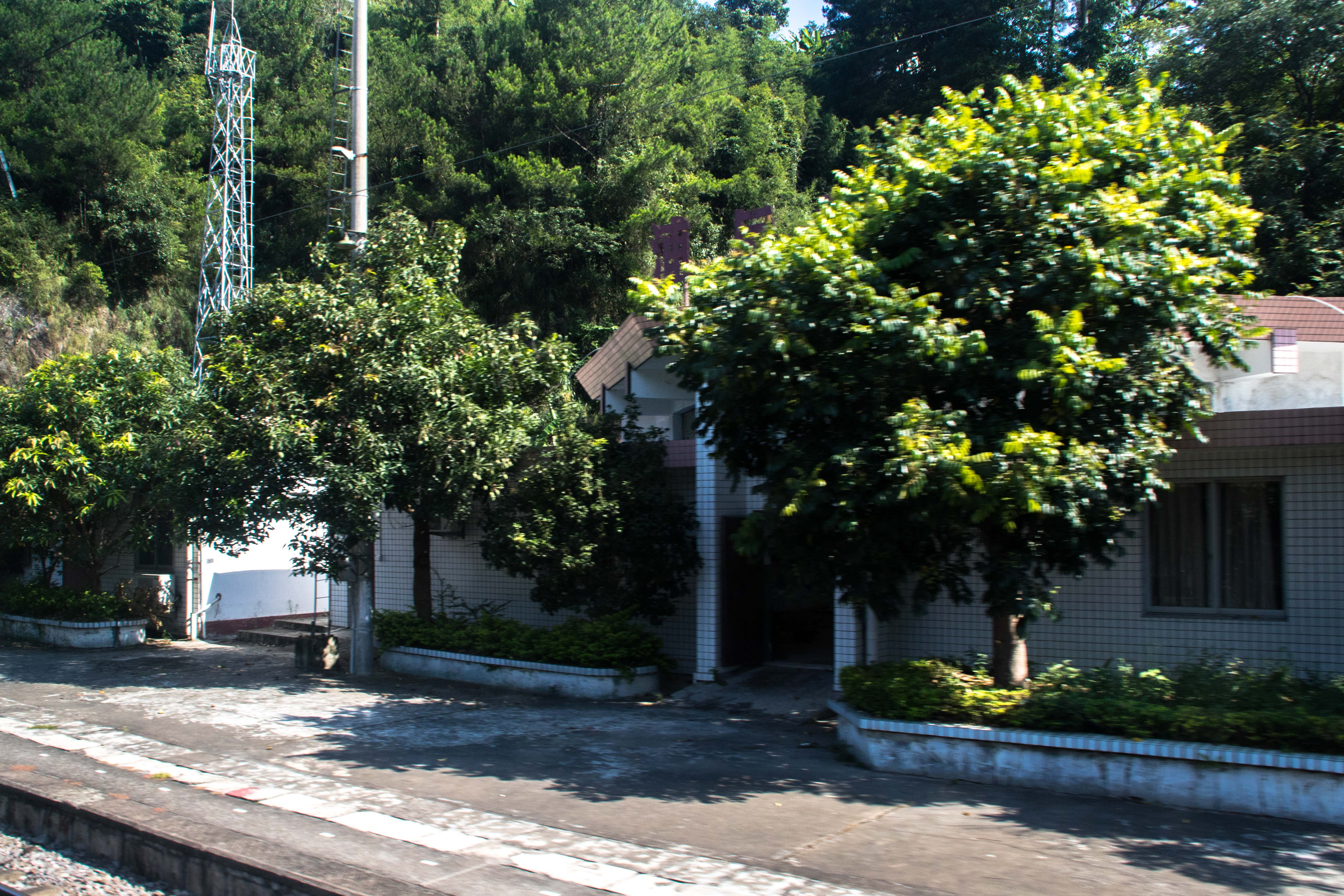 中文（中国大陆）: 浦后站站牌